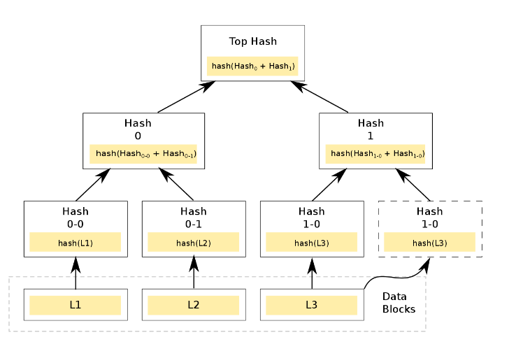 hash tree